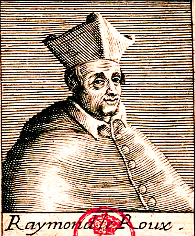 Cardinal Raymond Le Roux